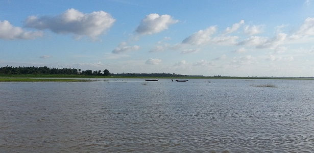 জবাই বিলের দৃশ্য